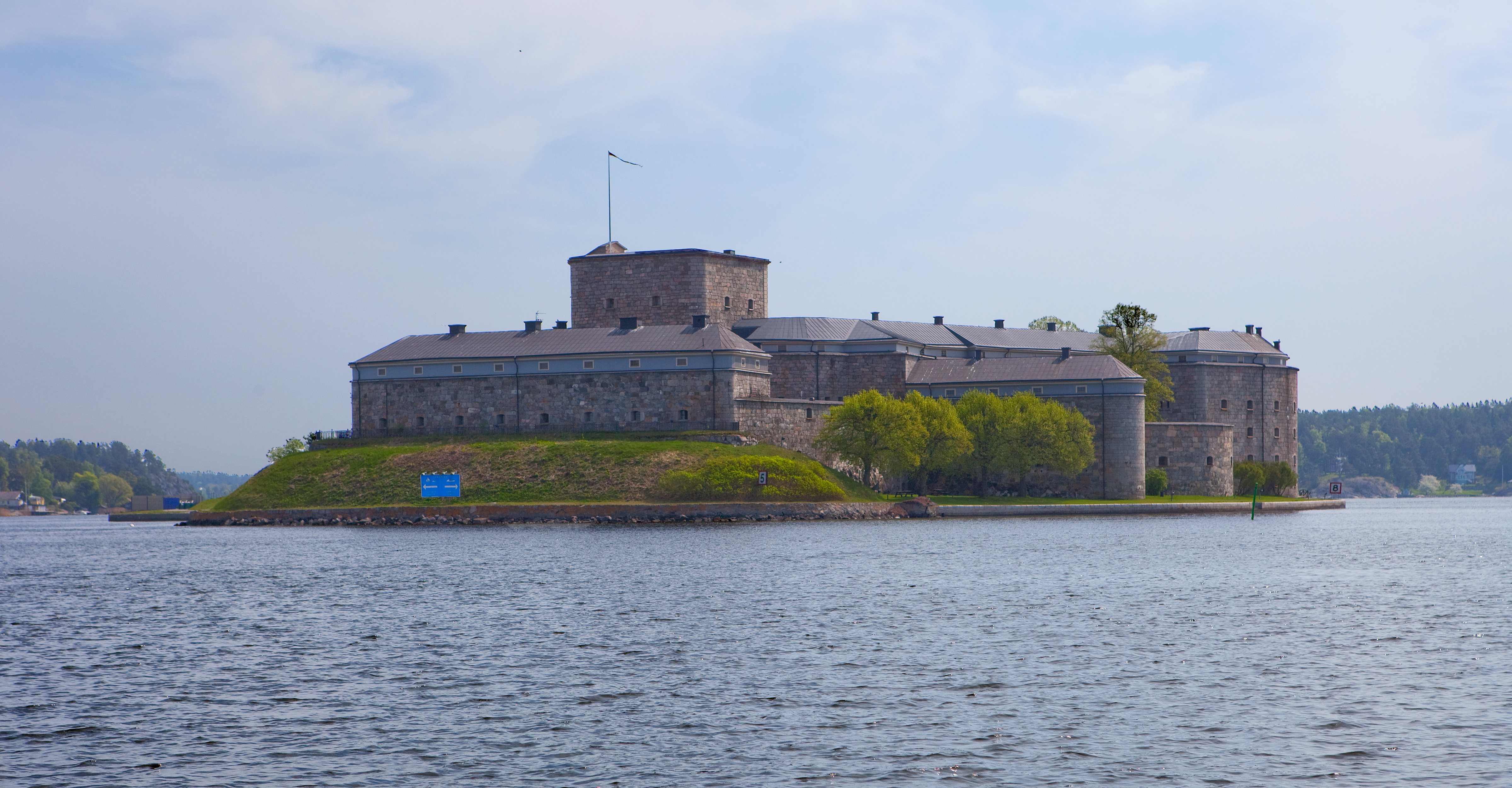 Kastellet, Vaxholm